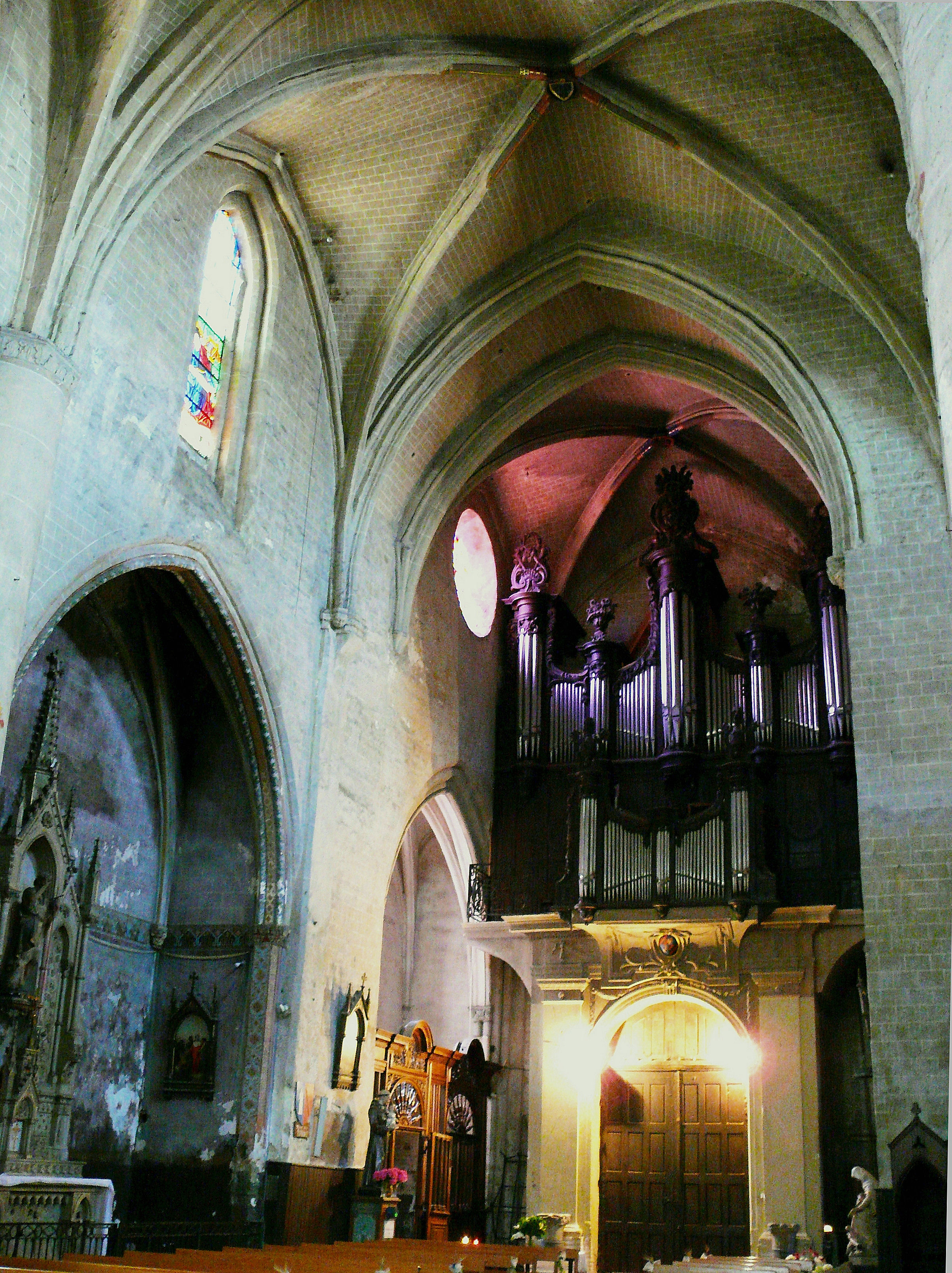 Cathédrale Sainte Marie de Lombez - Grande nef et orgue